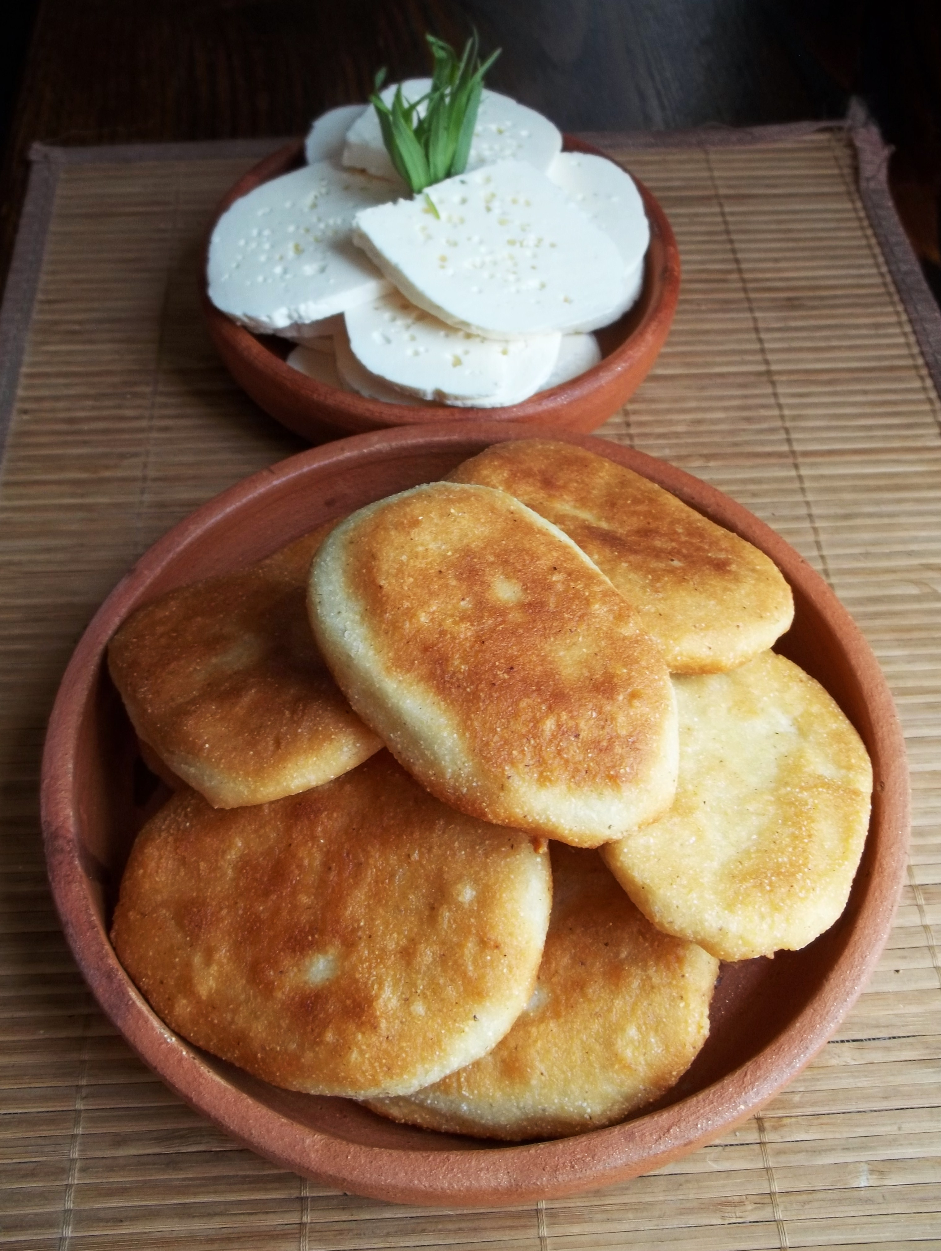 Мчади и имеретинский сыр